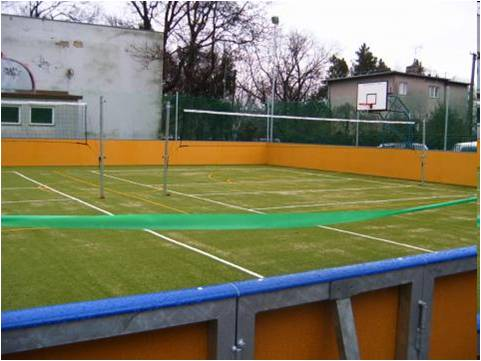 Multifunkcne ihrisko